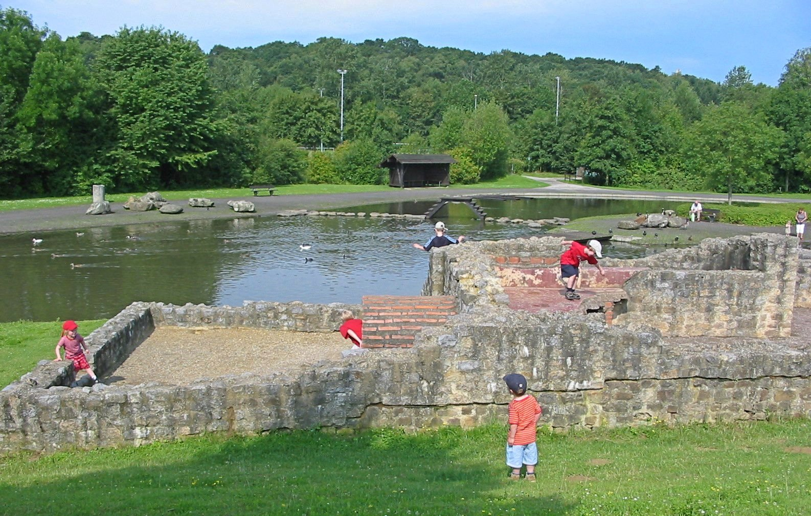 Römerbad im Naheerholungsgebiet Palenberg